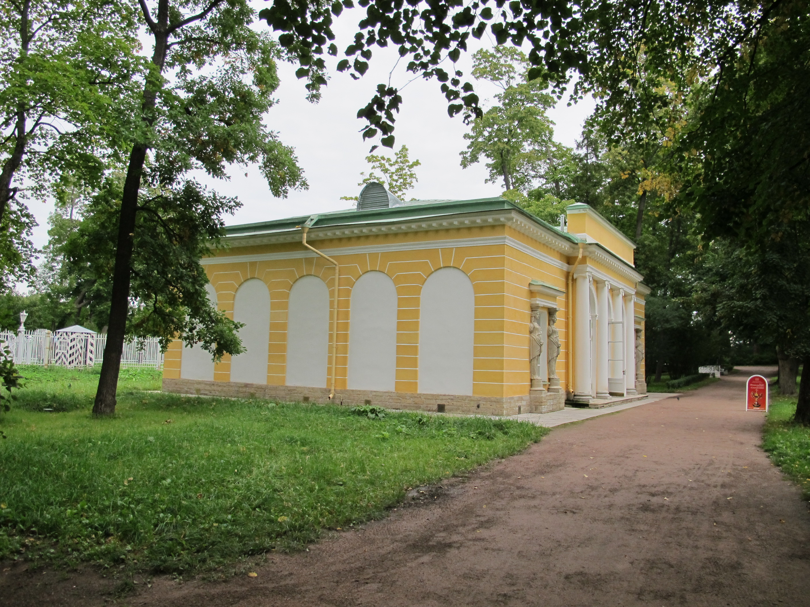 Evening hall